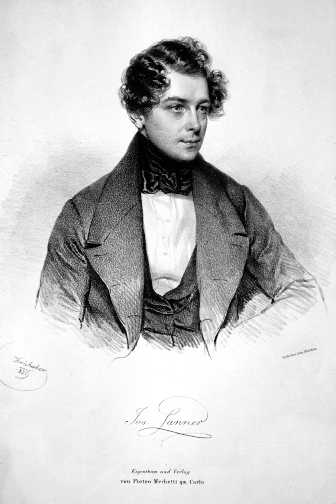 Josef Lanner (1801-1843), österreichischer Komponist und Musiker. Lithographie von Josef Kriehuber, 1839